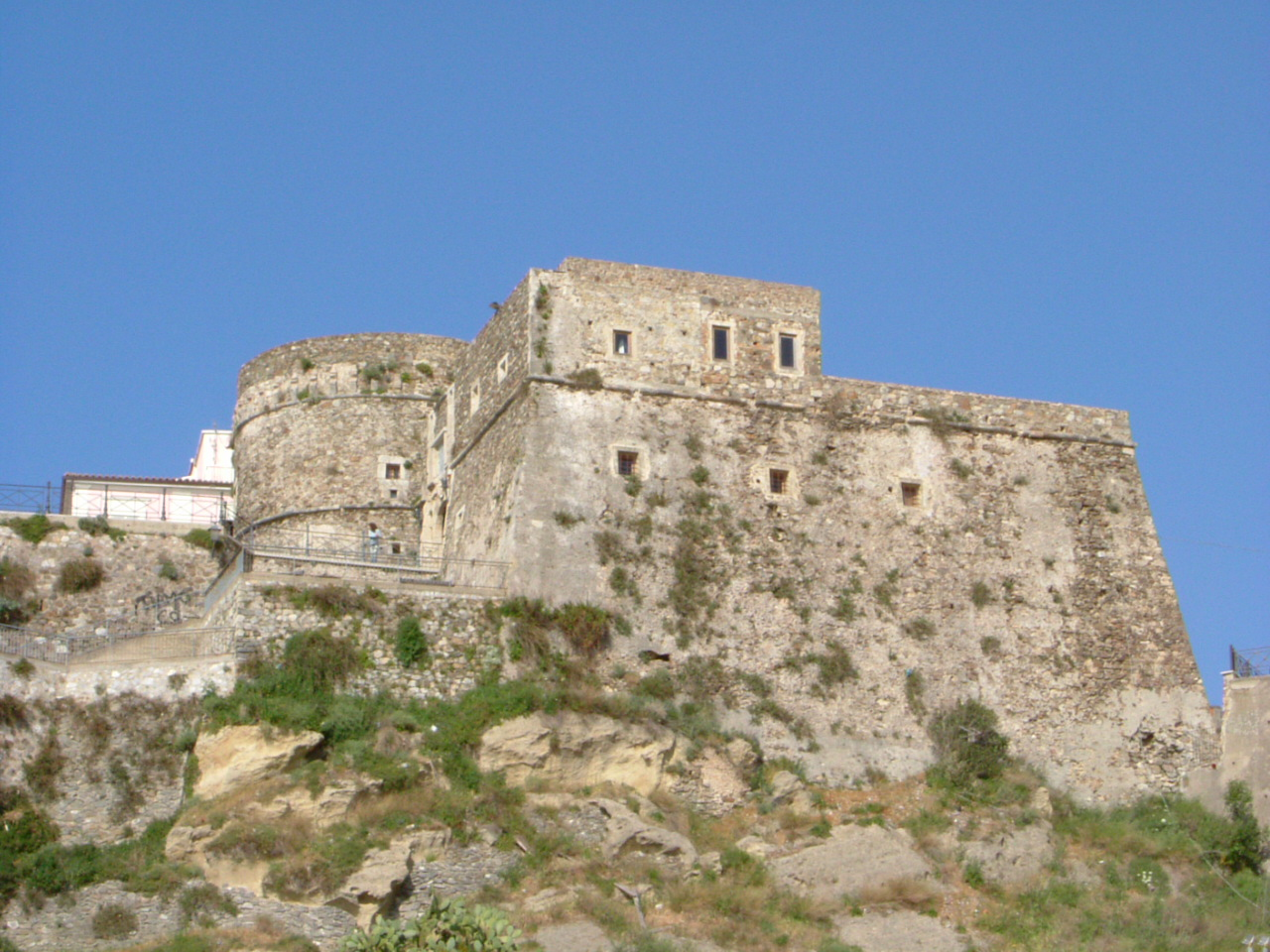 Castello di Pizzo Calabro